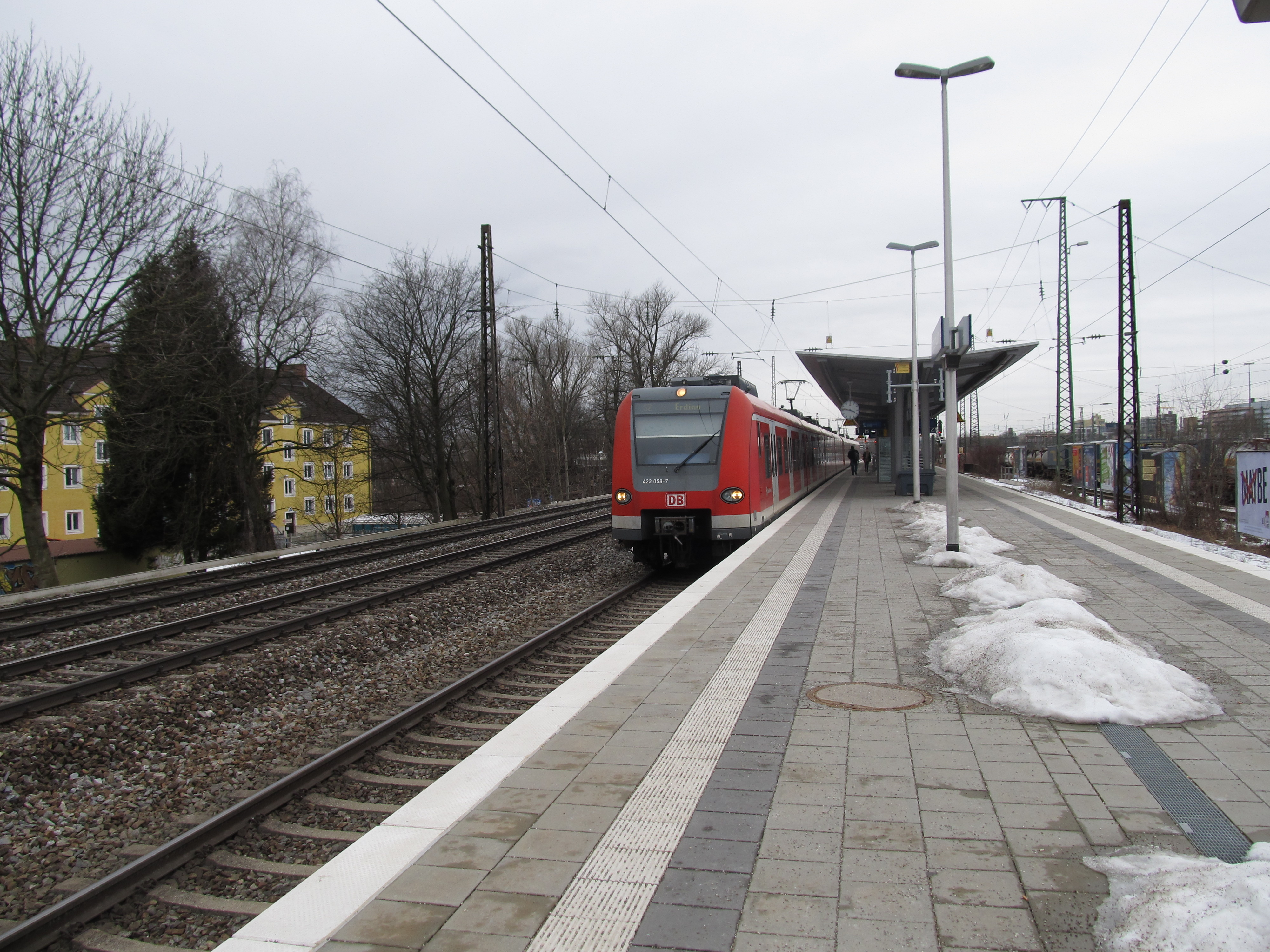 S-Bahn im Bahnhof Berg am Laim